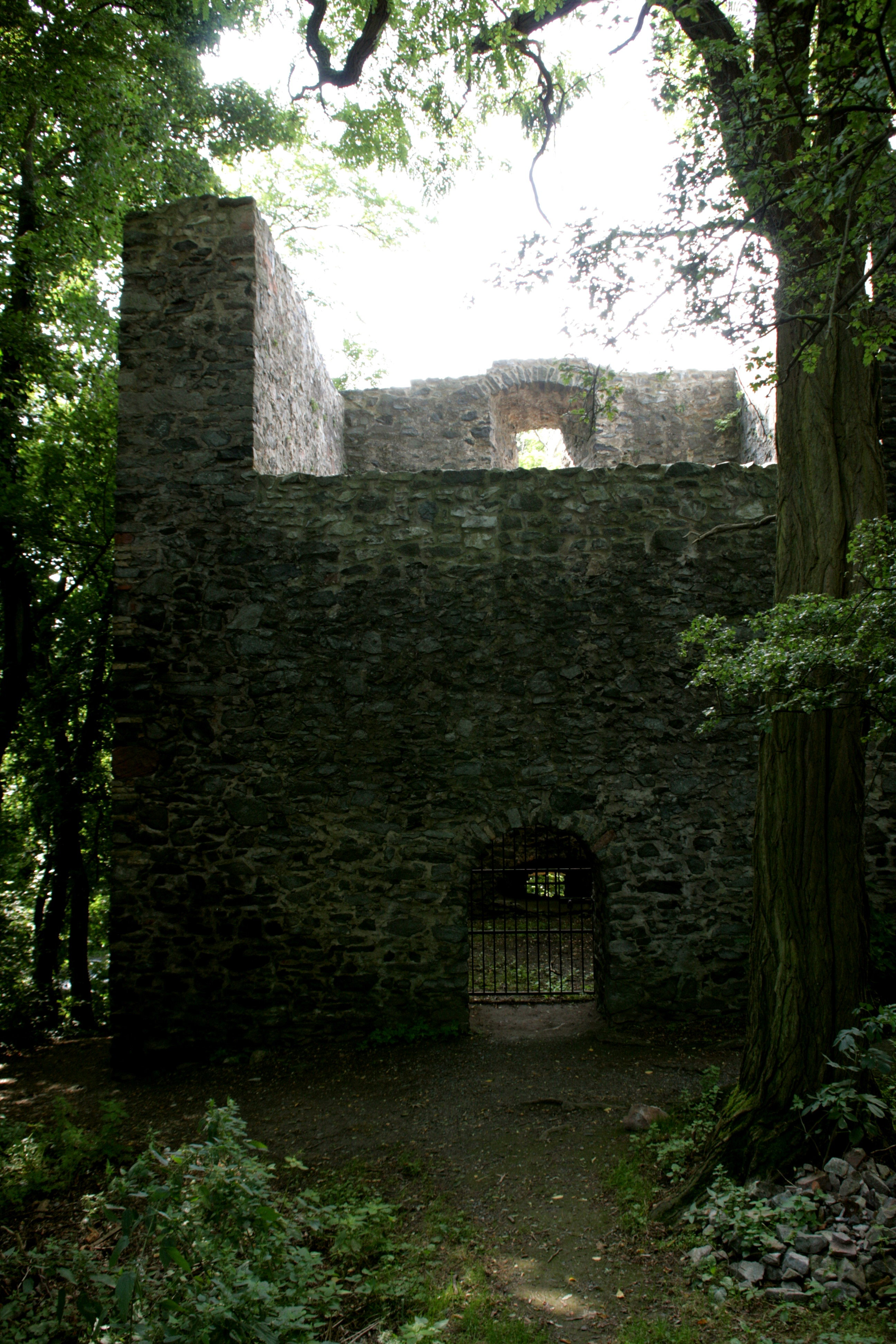 Burg Frankenstein in Mühltal (Hessen)